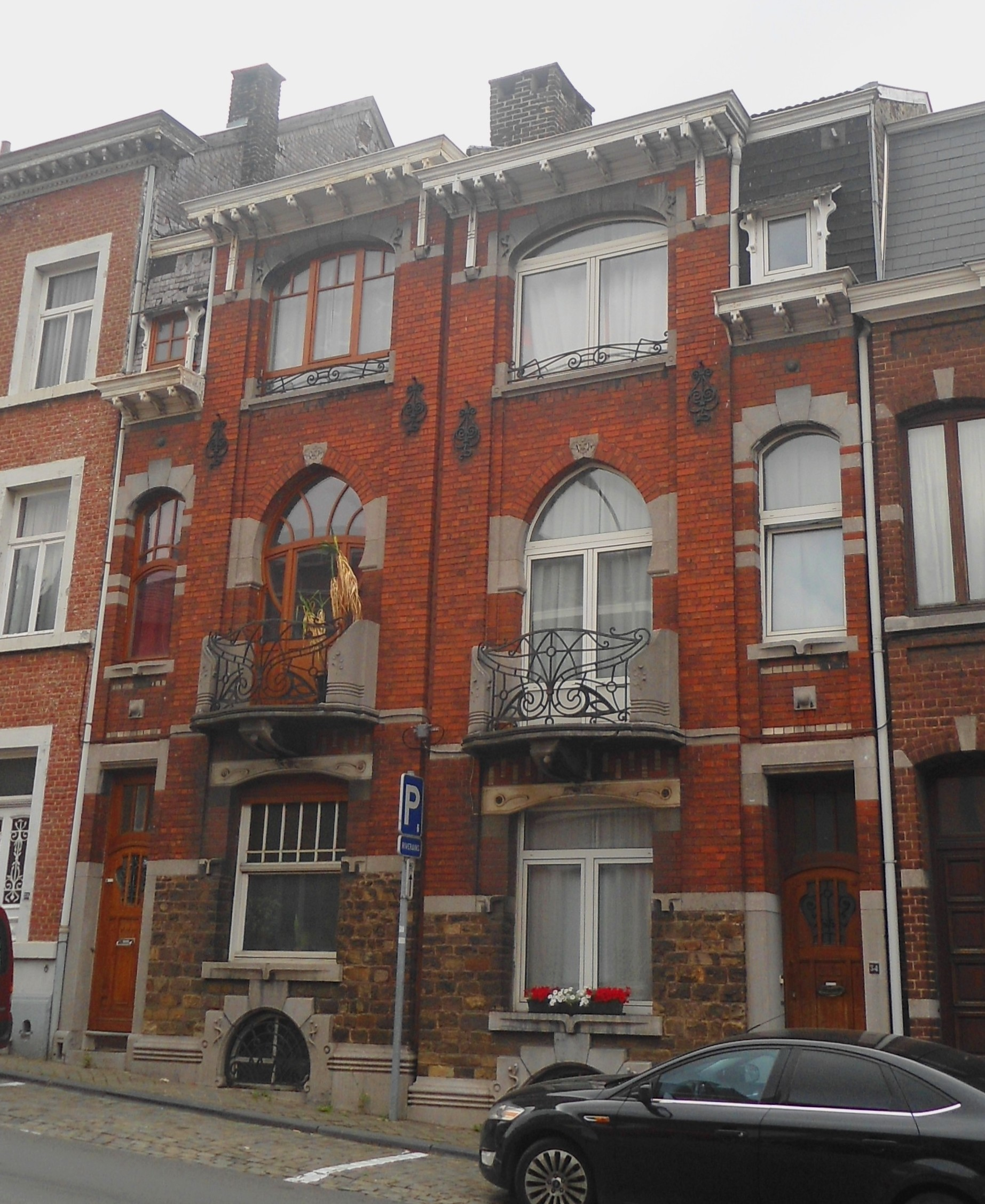 Maisons Thiriart Art nouveau Maurice Devignée 1911 Rue Montagne Sainte-Walburge, 34/36 Liège